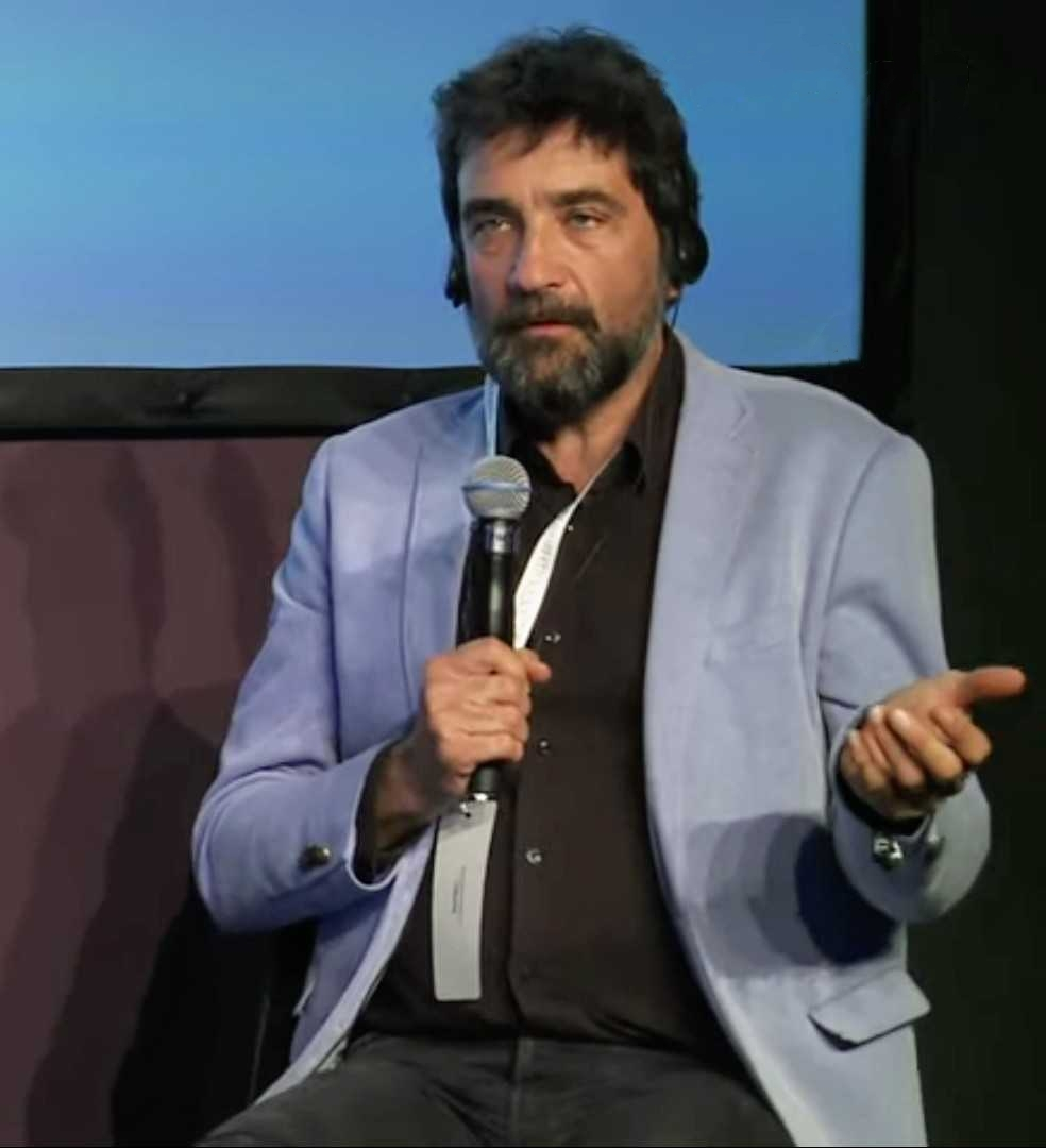 Find out more at: Ein Stadtmuseum, ein Kunstmuseum, ein Naturkundemuseum und eine Bibliothek gehen mutig neue Wege in der Kultur- und Wissensvermittlung. Sie öffnen sich - räumlich, inhaltlich und im Netz - nach außen und entwickeln neue Vermittlungsformate für eine zunehmend digitale Gesellschaft. Wie kommt das bei Besucher*innen an, welche Herausforderungen gilt es intern zu überwinden, und was bleibt zu tun in der Berliner Kulturlandschaft und darüber hinaus? Viele Fragen für ein starkes Berliner Kulturpanel. Wiebke Rössig Danilo Vetter: | | Paul Spies Thomas Köhler Creative Commons Attribution-ShareAlike 4.0 Germany (CC BY-SA 4.0 DE)